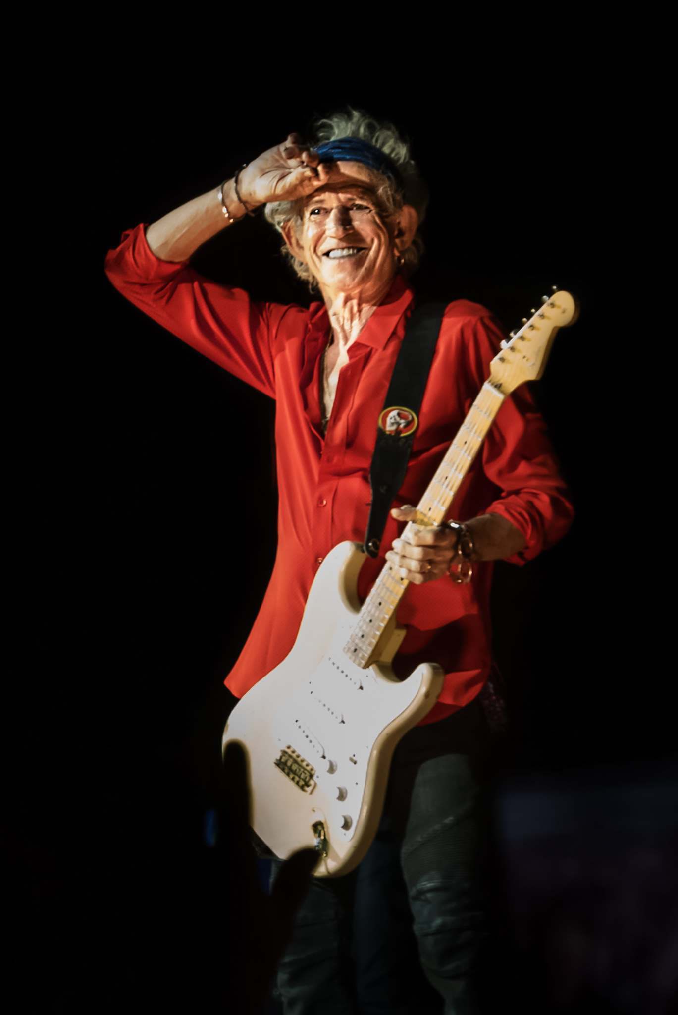 Keith Richards podczas koncertu w Warszawie w 2018 r.